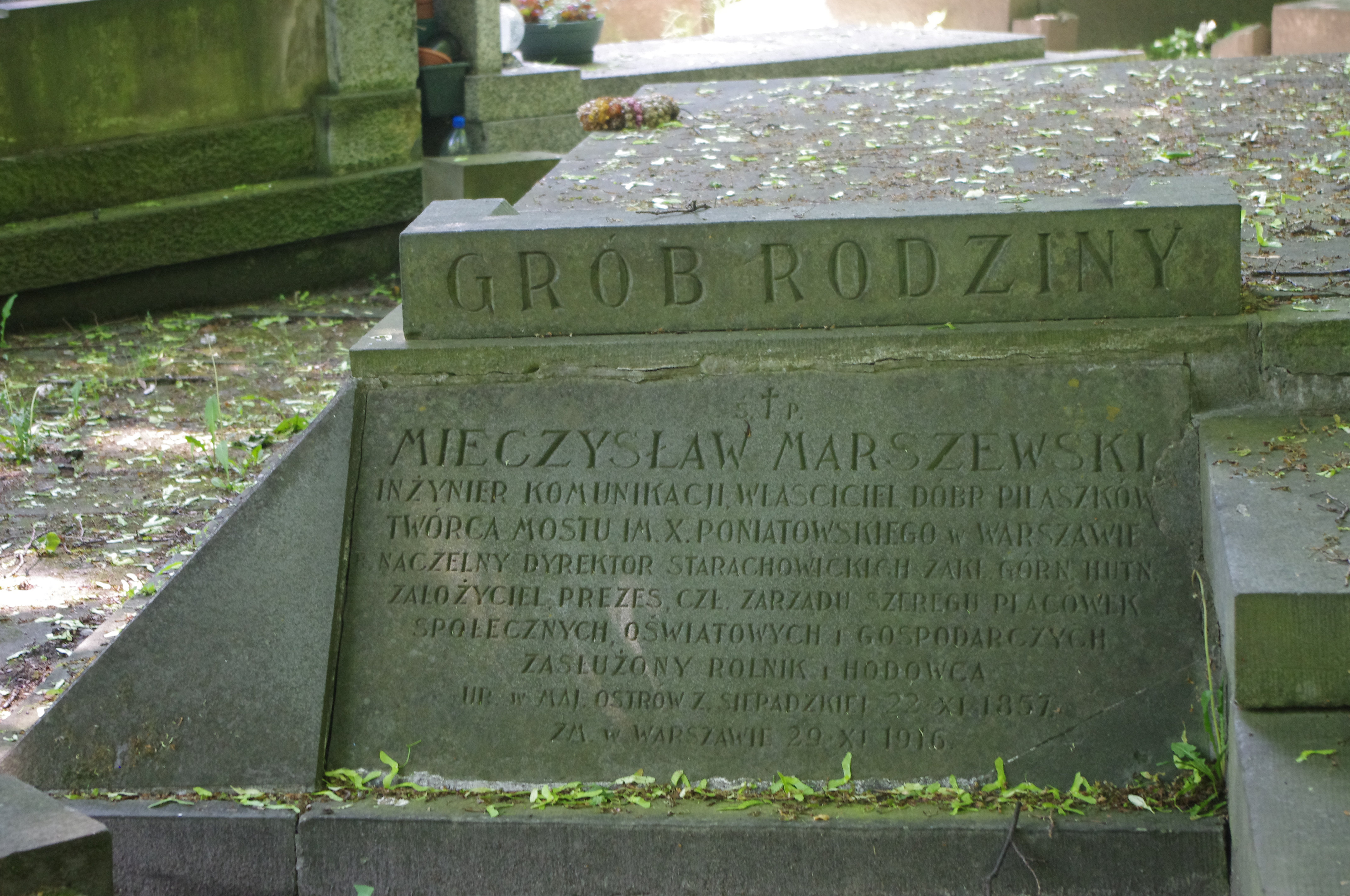 Grób architekta Mieczysława Marszewskiego – projektanta Mostu Poniatowskiego w Warszawie na Cmentarzu Powązkowskim w Warszawie